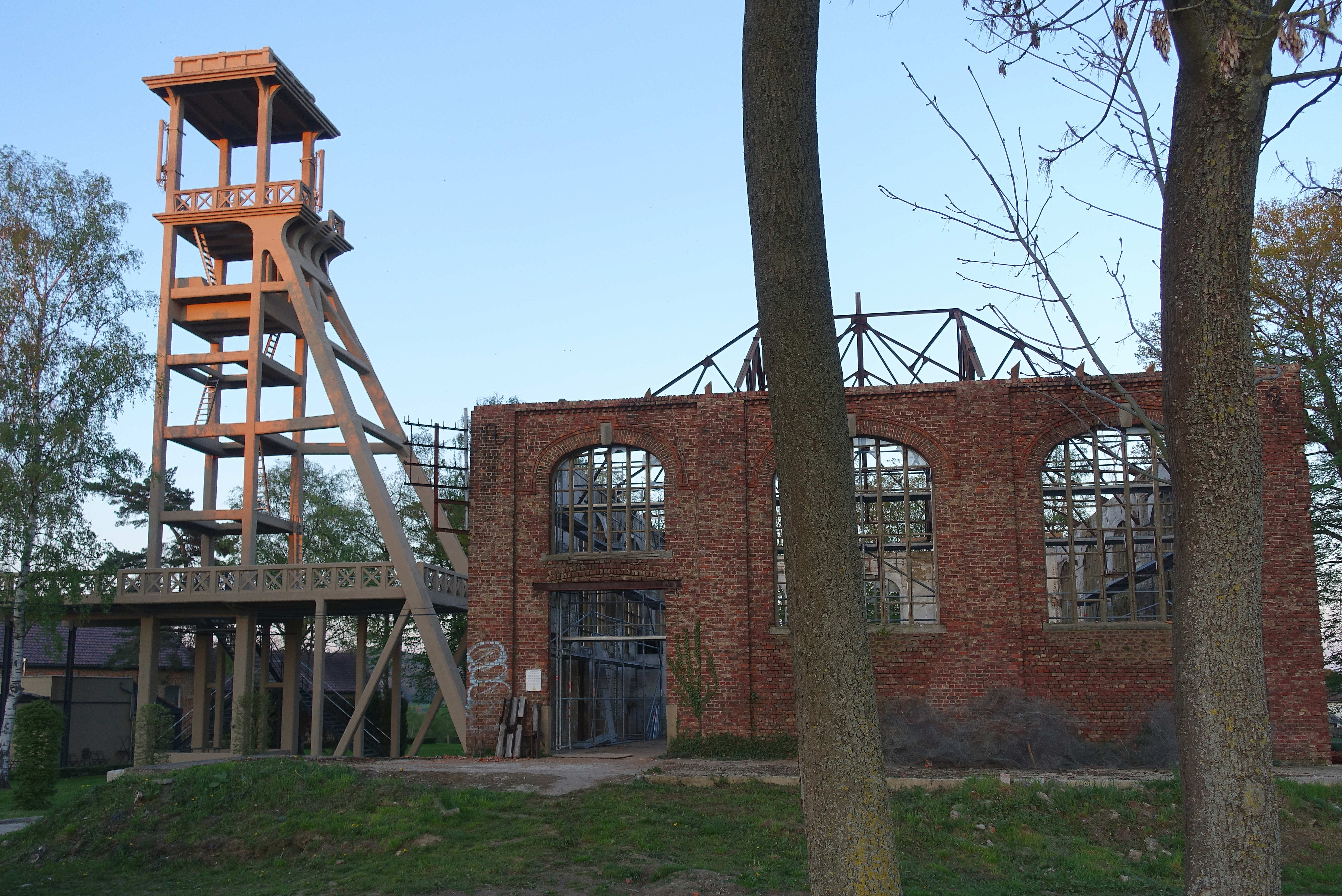 Charbonnage de Sainte-Barbe du Bois Planté Florifoux Floreffe